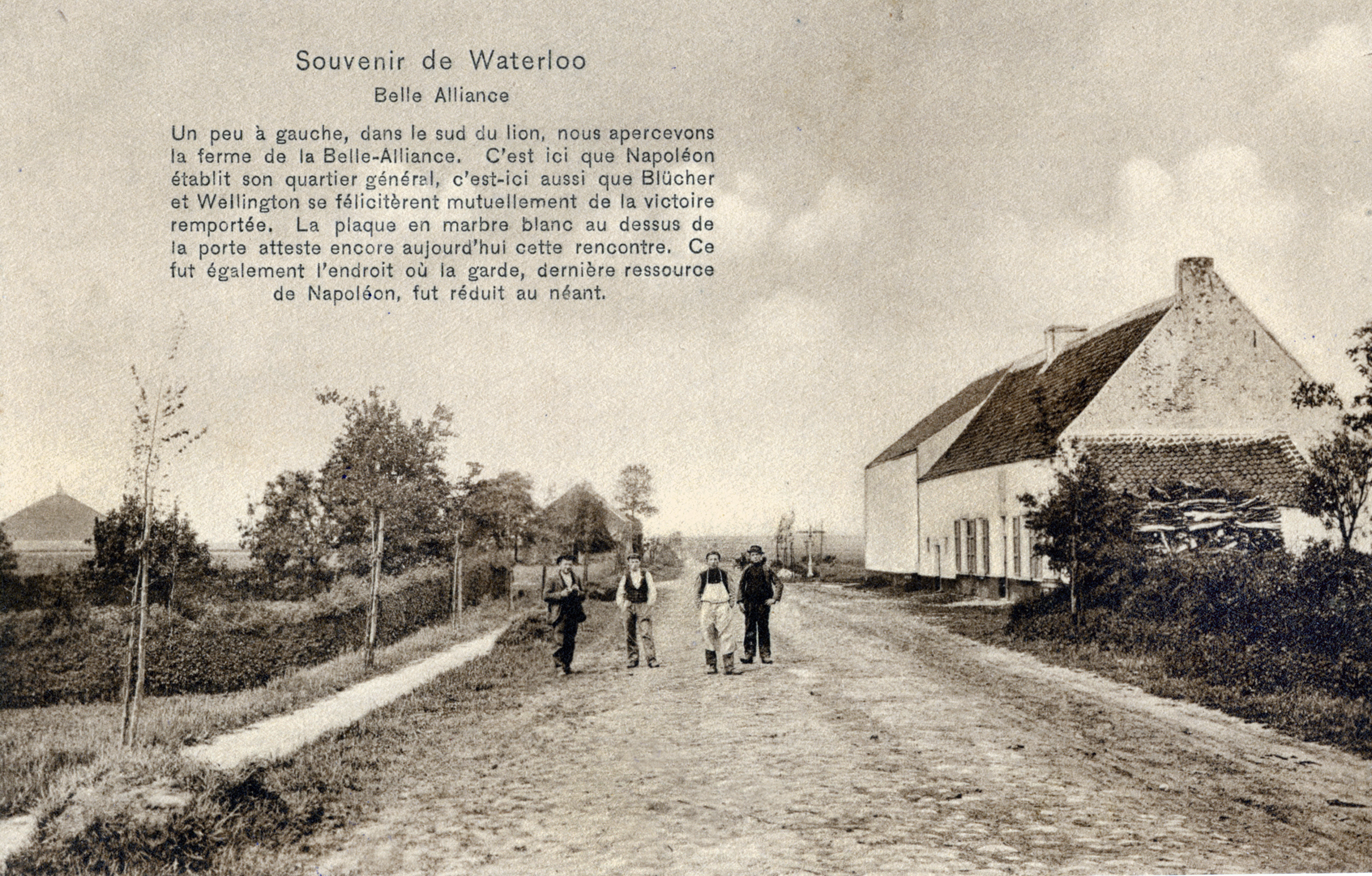 Waterloo Belle-Alliance- carte postale +-1900